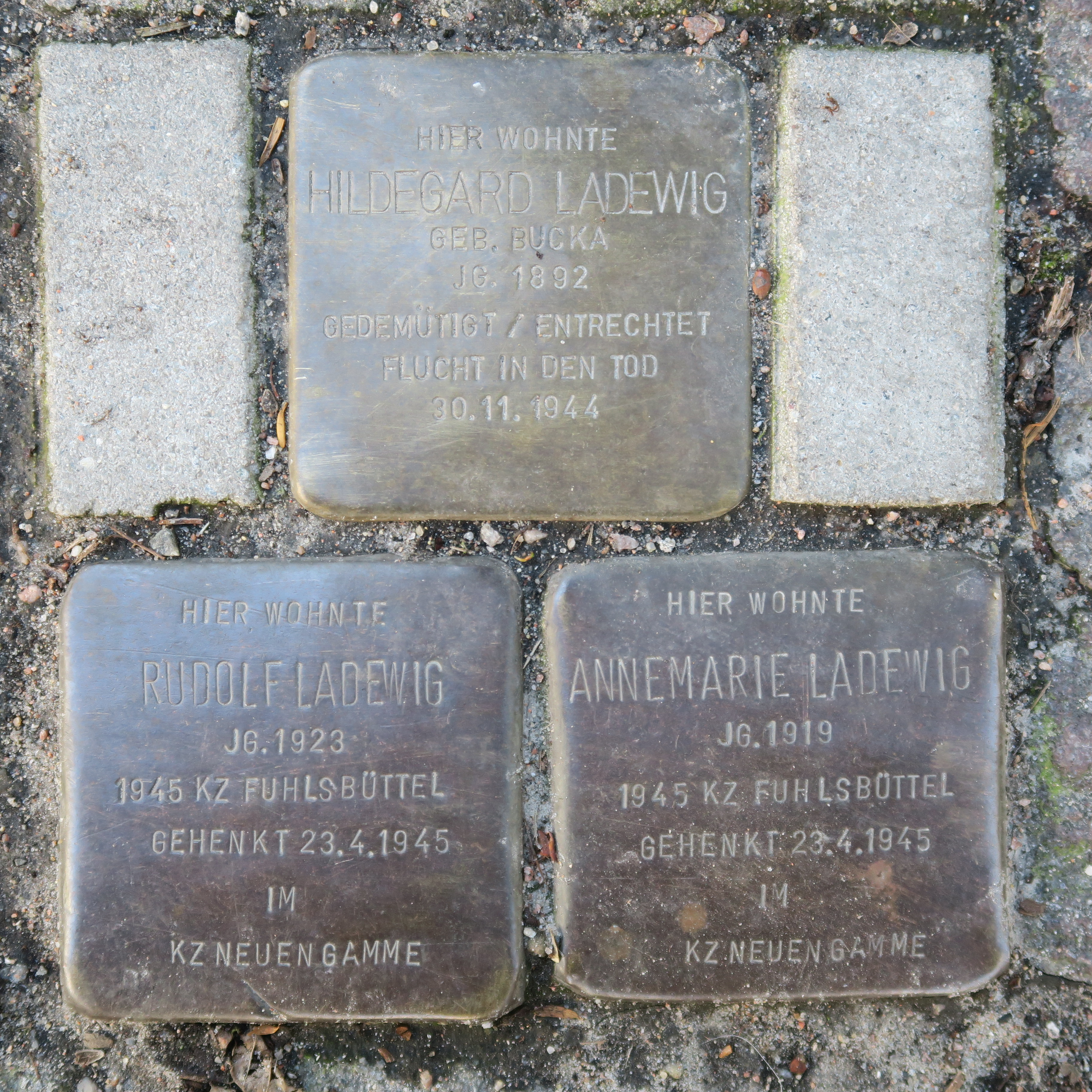 Stolpersteine für die Familie Ladewig in Hamburg-Winterhude